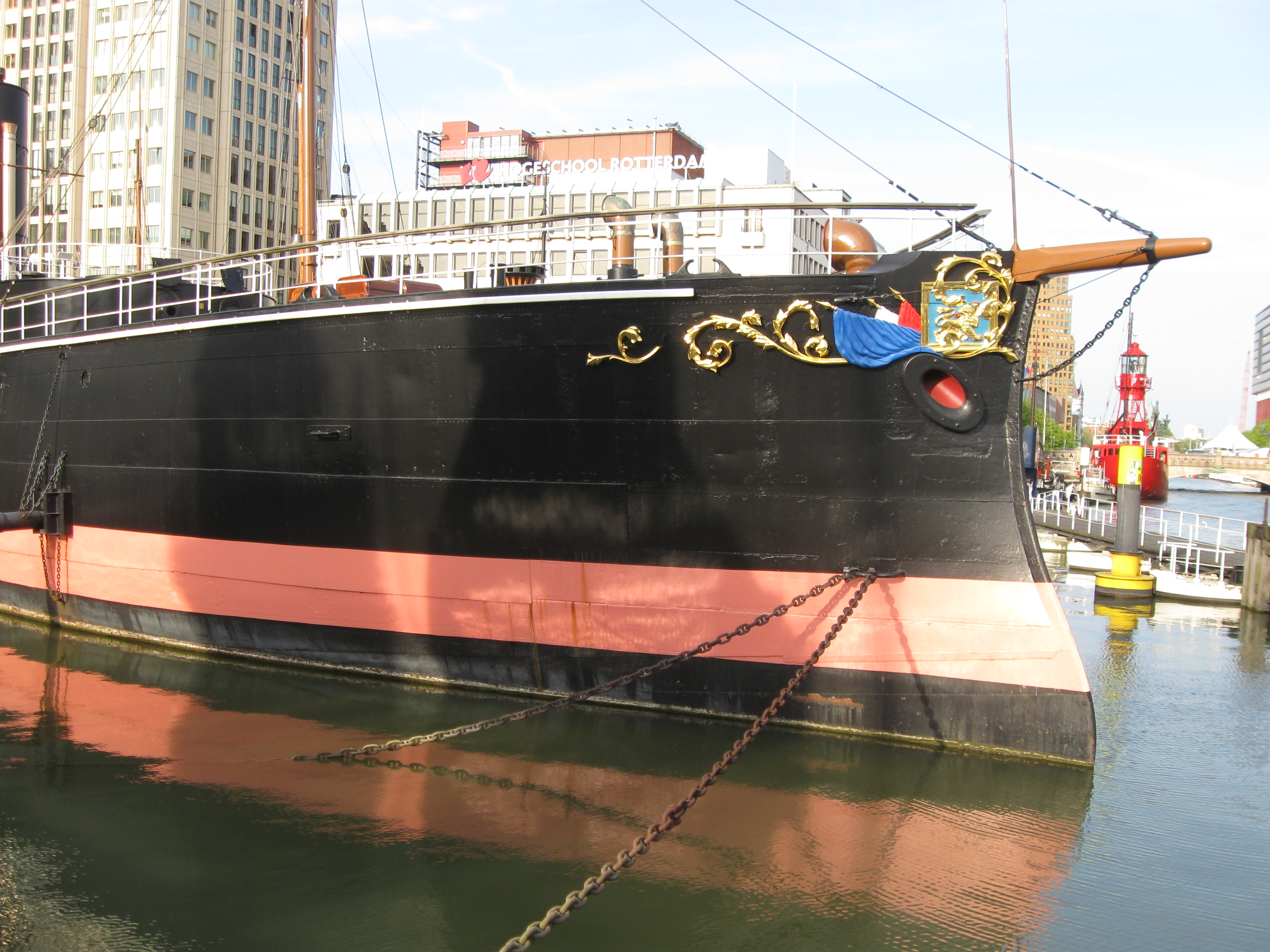 Das Museumschiff Buffel im Marinemuseum Rotterdam